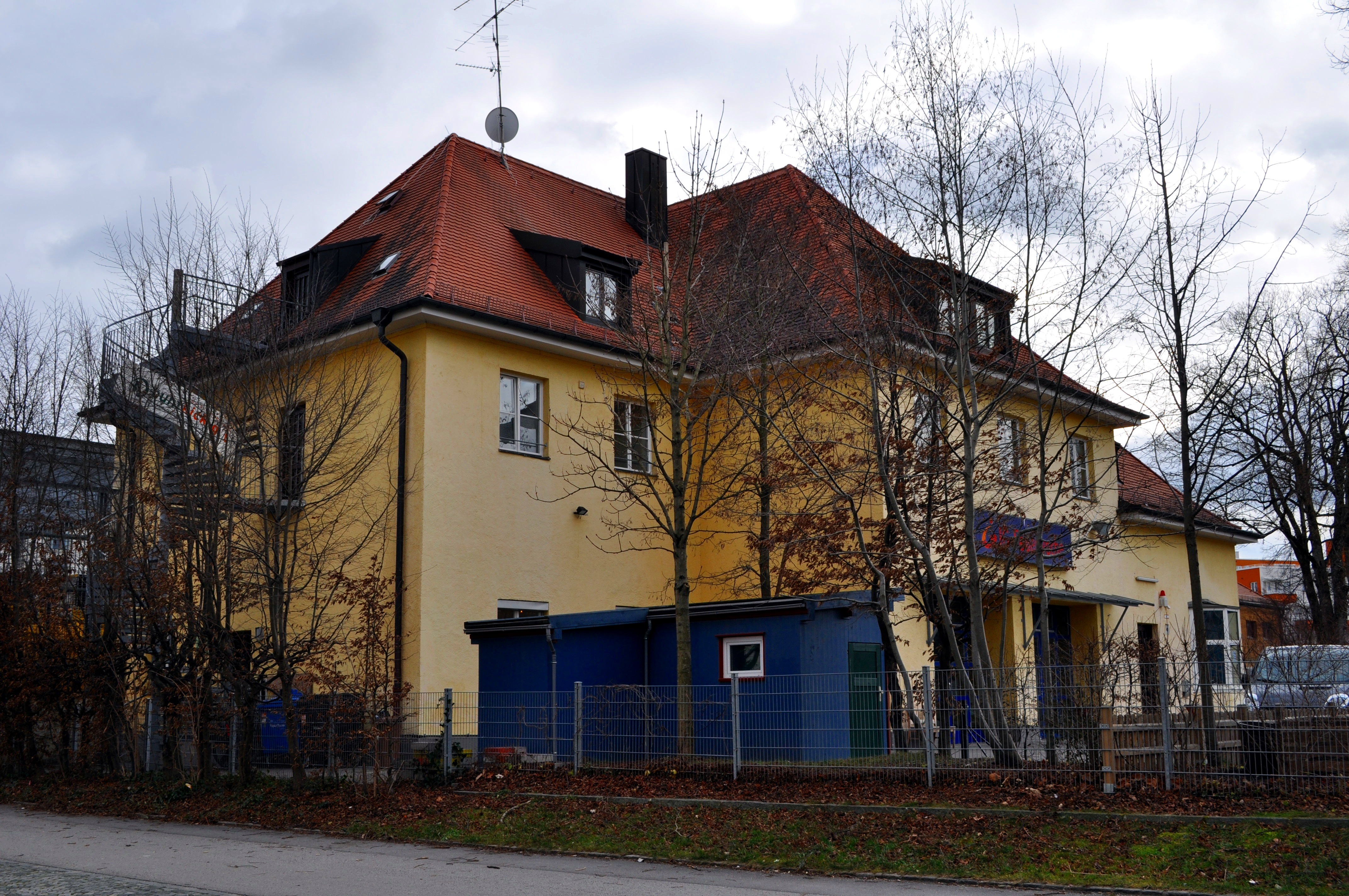 Sitz von Bunt kickt gut im Umspannwerk Theresienhöhe, Ganghoferstraße 41; Fotografiert von Norden